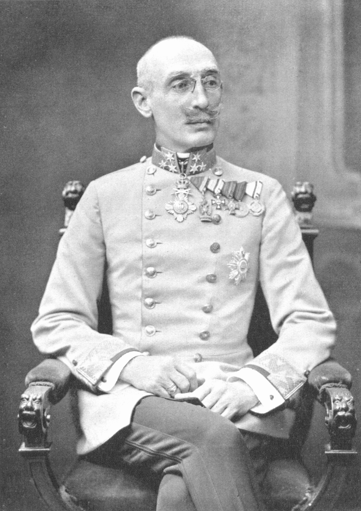 Hans Karl von Kirchbach auf Lauterbach (1856-1939), Austrian-Hungarian general